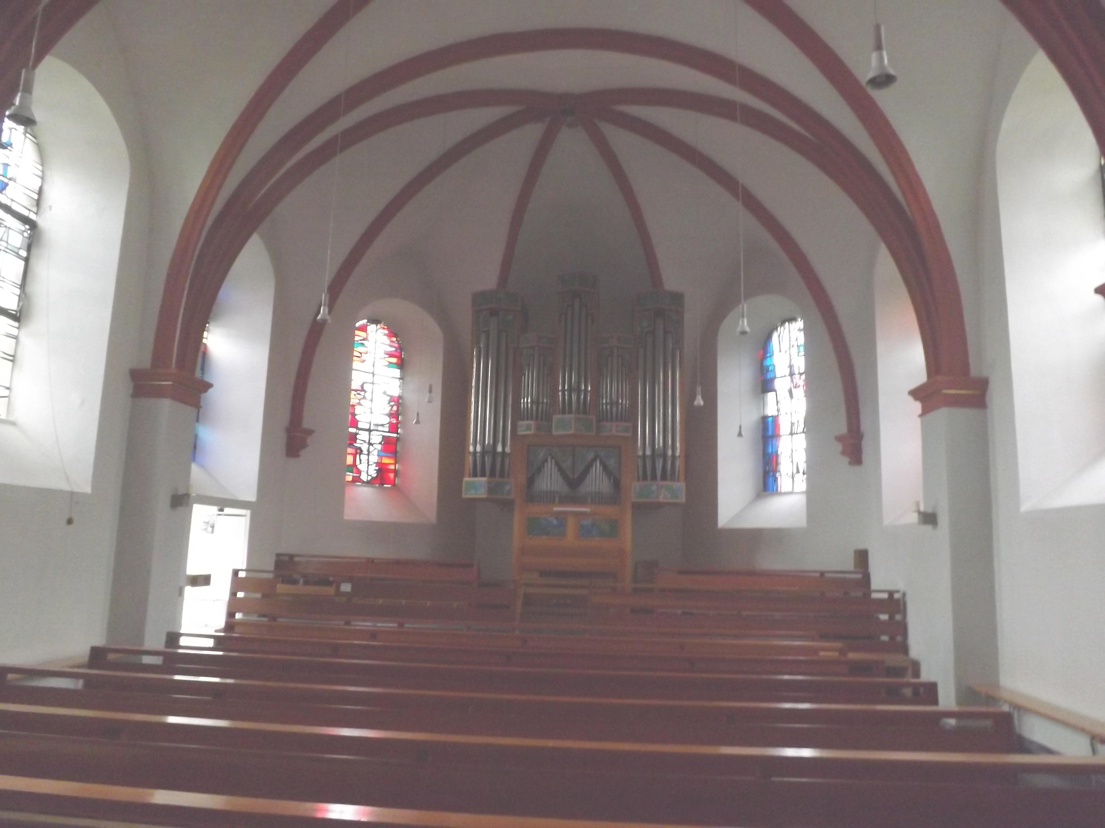 Orgelraum Sankt Gertrud Lünebach